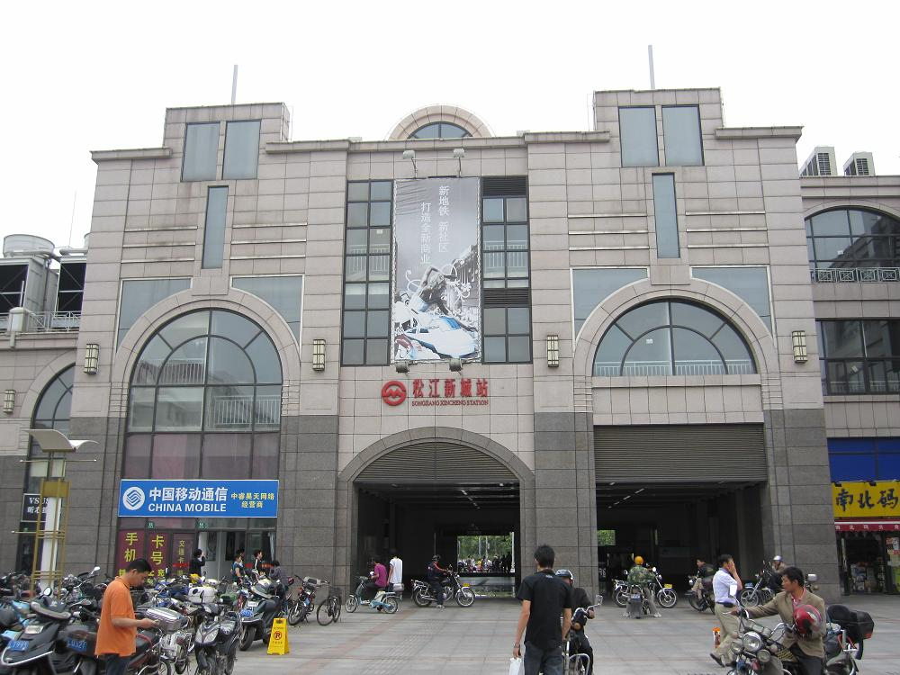 description